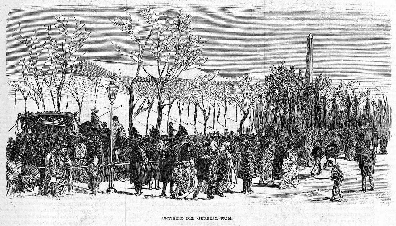 «Entierro del general Prim», en la revista La Ilustración de Madrid.